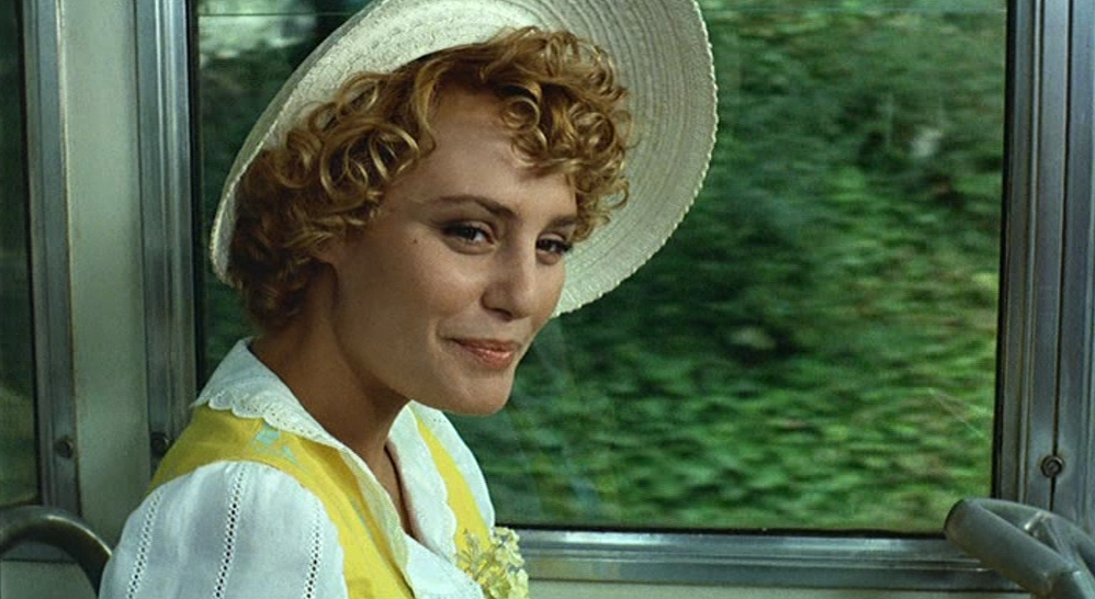 Screenshot del film Intervista di Federico Fellini (1987)